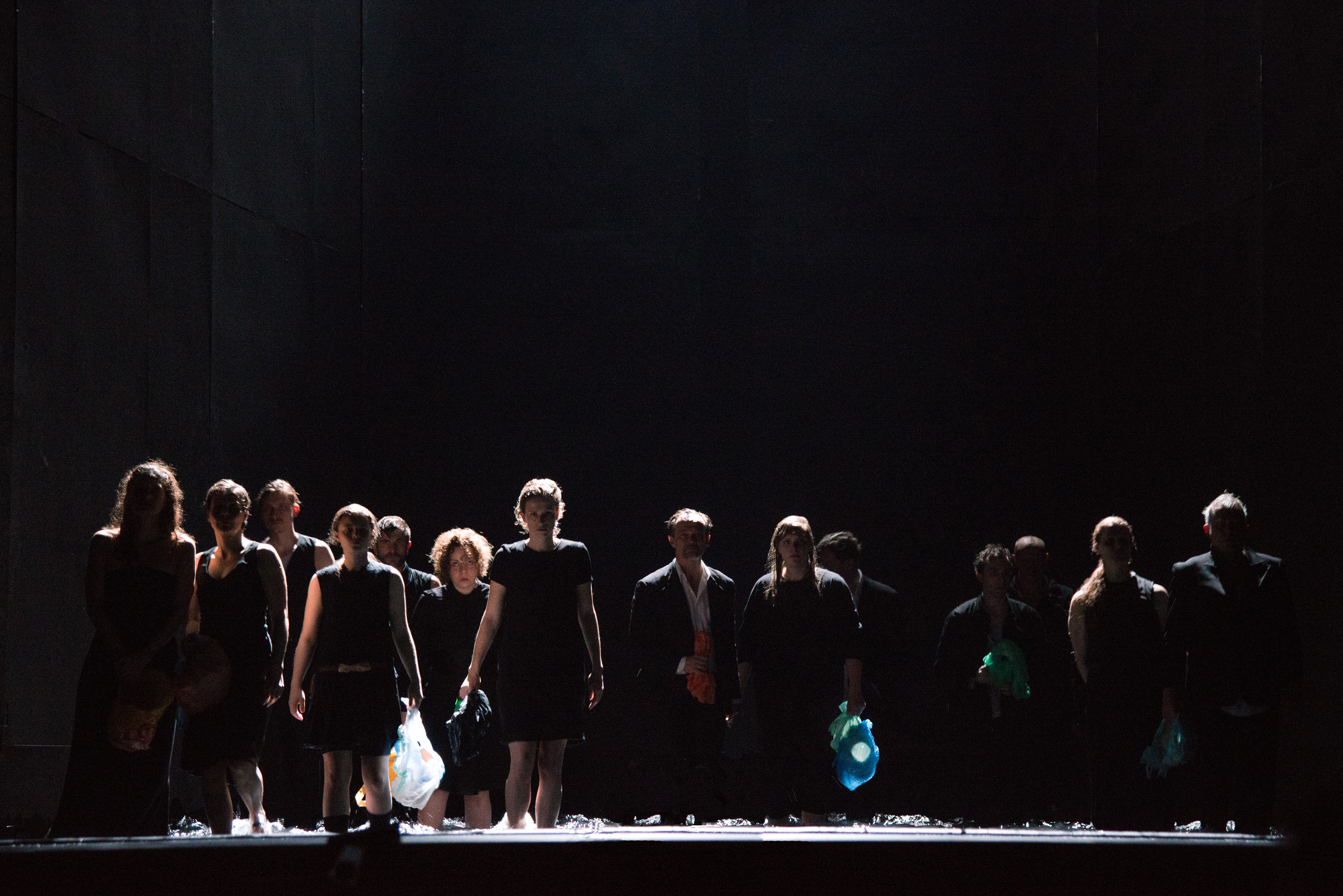 Die Schutzbefohlenen von Elfriede Jelinek, Burgtheater Wien 2015